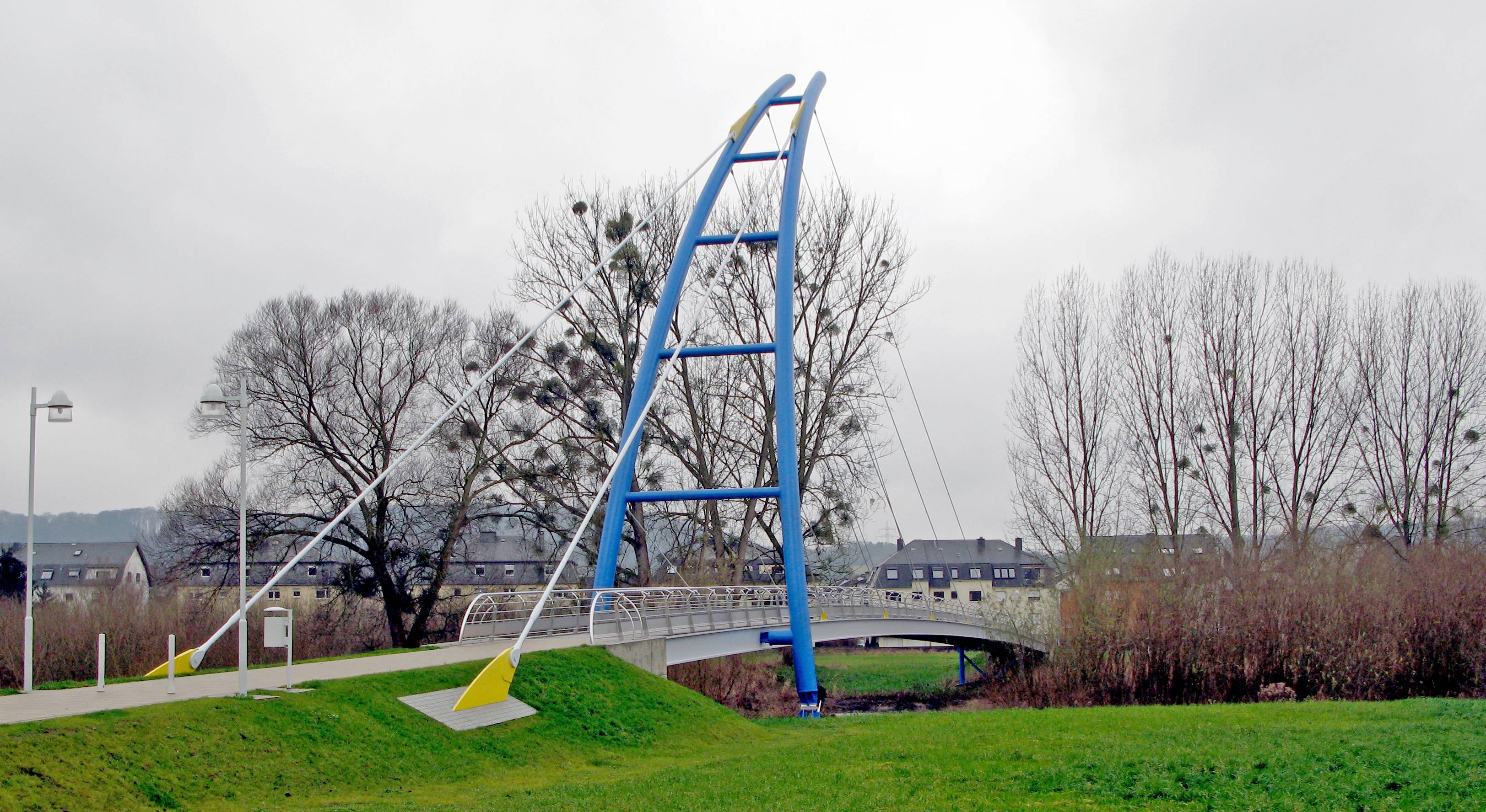 Walfer Foussgängerbréck. Kategorie:Gemeng Walfer Kategorie:Brécken zu Lëtzebuerg